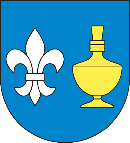 Herb gminy Koczała.